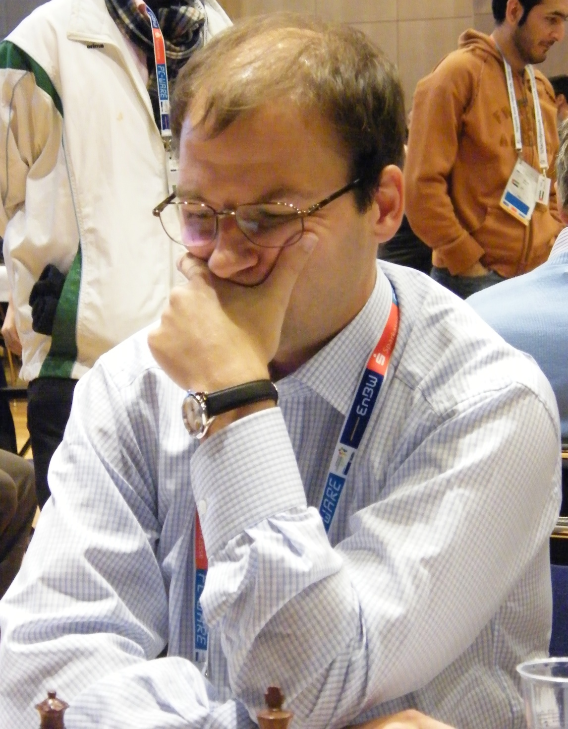 Siegfried Baumegger bei der 38. Schacholympiade in Dresden 2008